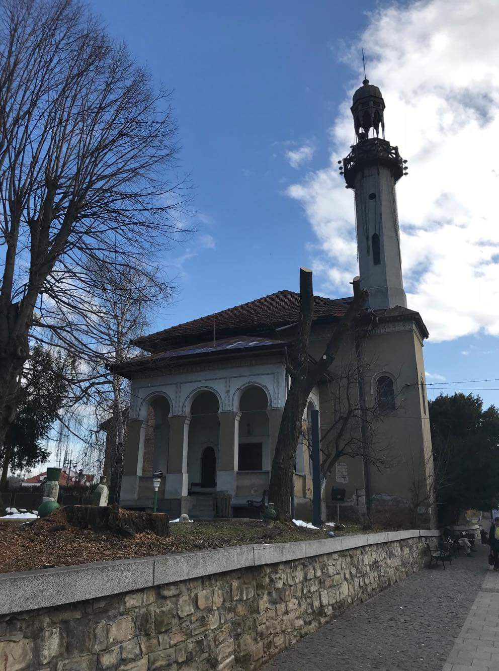 Sarena Dzamija, Tuzla, BiH